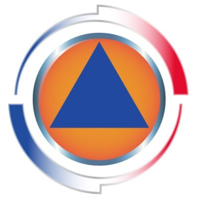 Logo de la DGSCGC